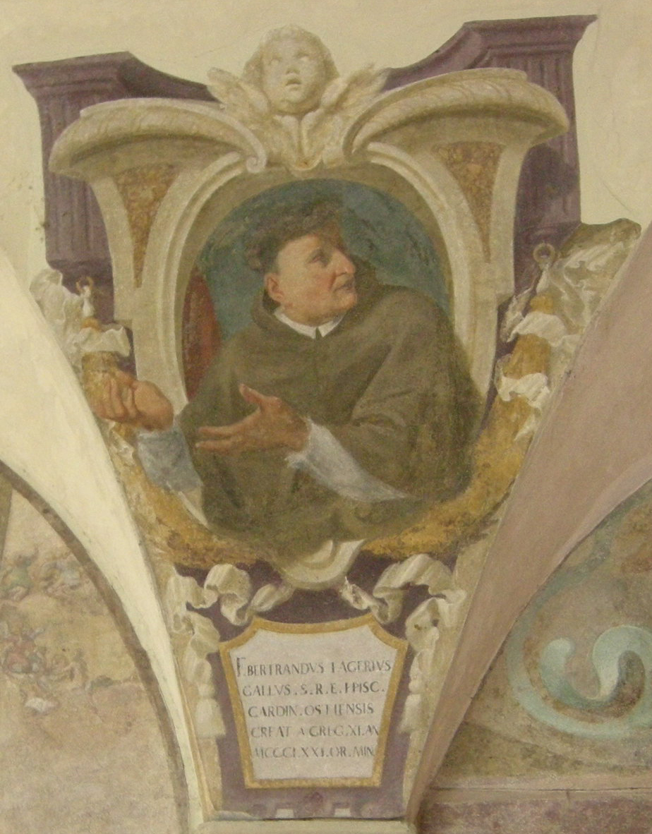 Chiostro di ognissanti, personalità francescane 25 Bertrand Lagier